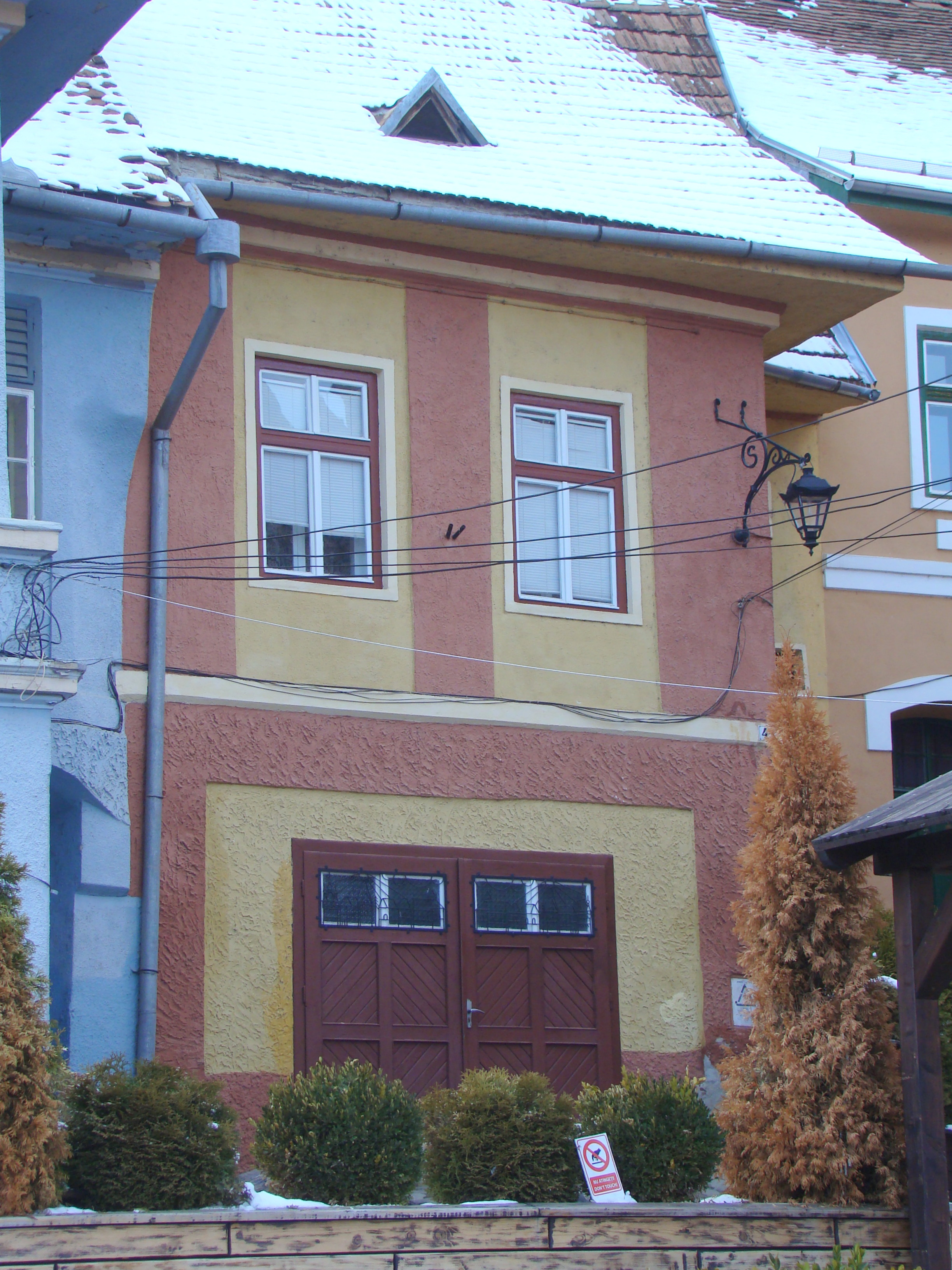 Casa Fink, municipiul Sighișoara, Piața Oberth Hermann 41 sec. XVII - XVIII, sec. XIX